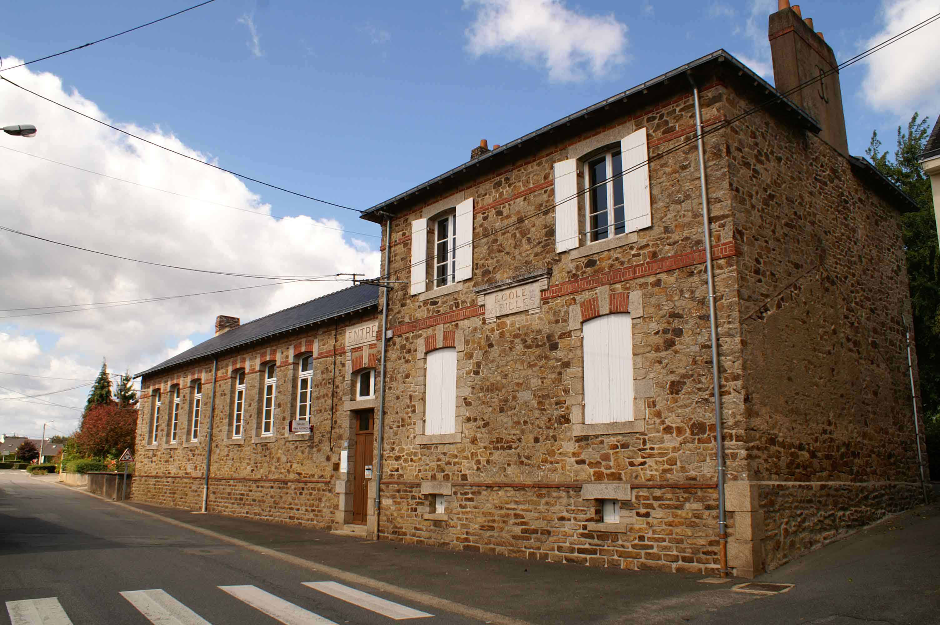 Marzan : ancienne école des Filles de 1933, devenue salle municipale des ajoncs